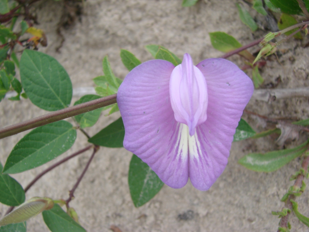 Centrosema virginianum - FABACEAE - Praia do Mo�ambique - Florian�polis - SC - Brasil